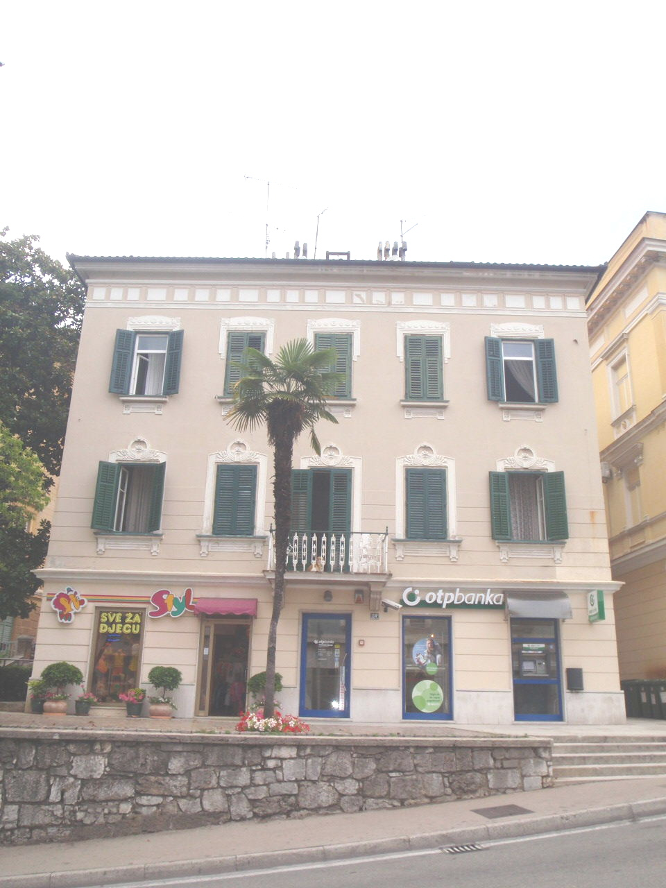 OTP Bank Opatija